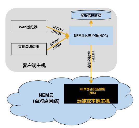 中文（中国大陆）: NEM架构图